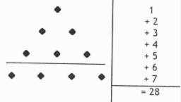 números "triangulares"